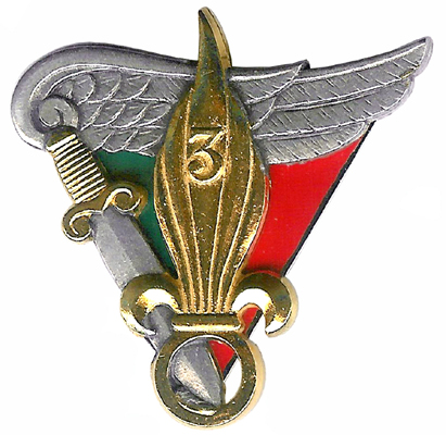 insigne du 3ème BEP